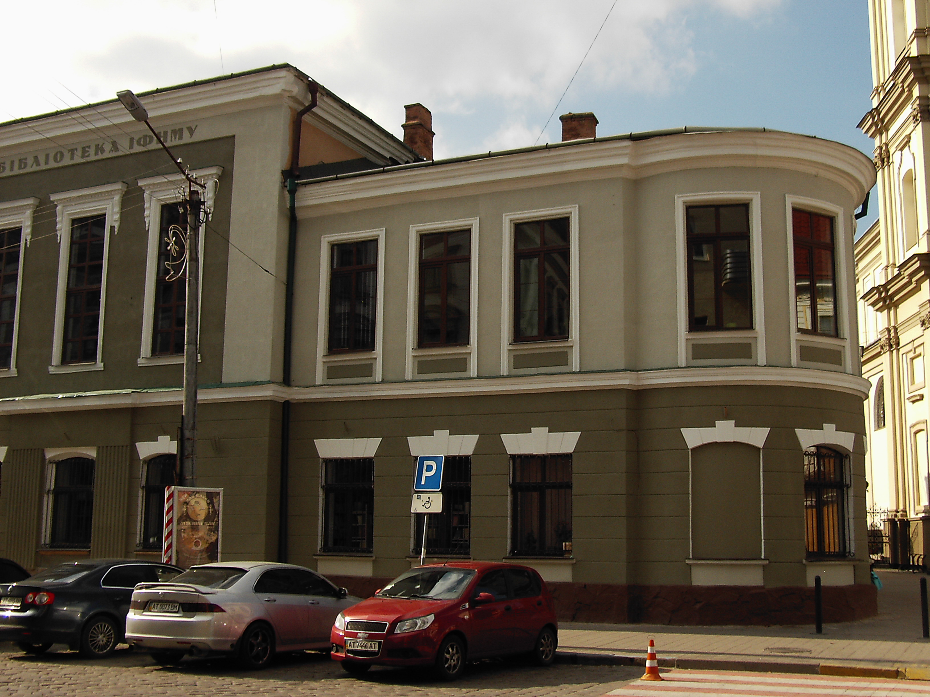 Івано-Франківський Національний Медичний Університет. Бібліотека. м. Івано-Франківськ-1, вул. Галицька, 7а